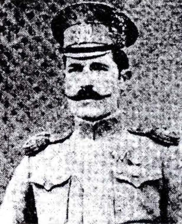 Српски (ћирилица): Портрет капетана Ђура Драшковића